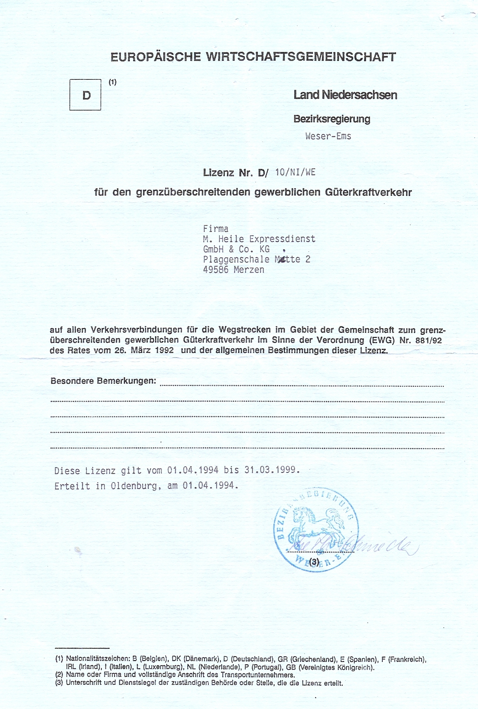 EWG Transport-Lizenz für grenzüberschreitenden Güterverkehr. Orginal von 1994